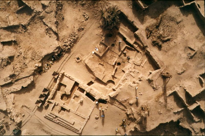 أطلال مدينة جرمة في ليبيا عاصمة الجرمنت